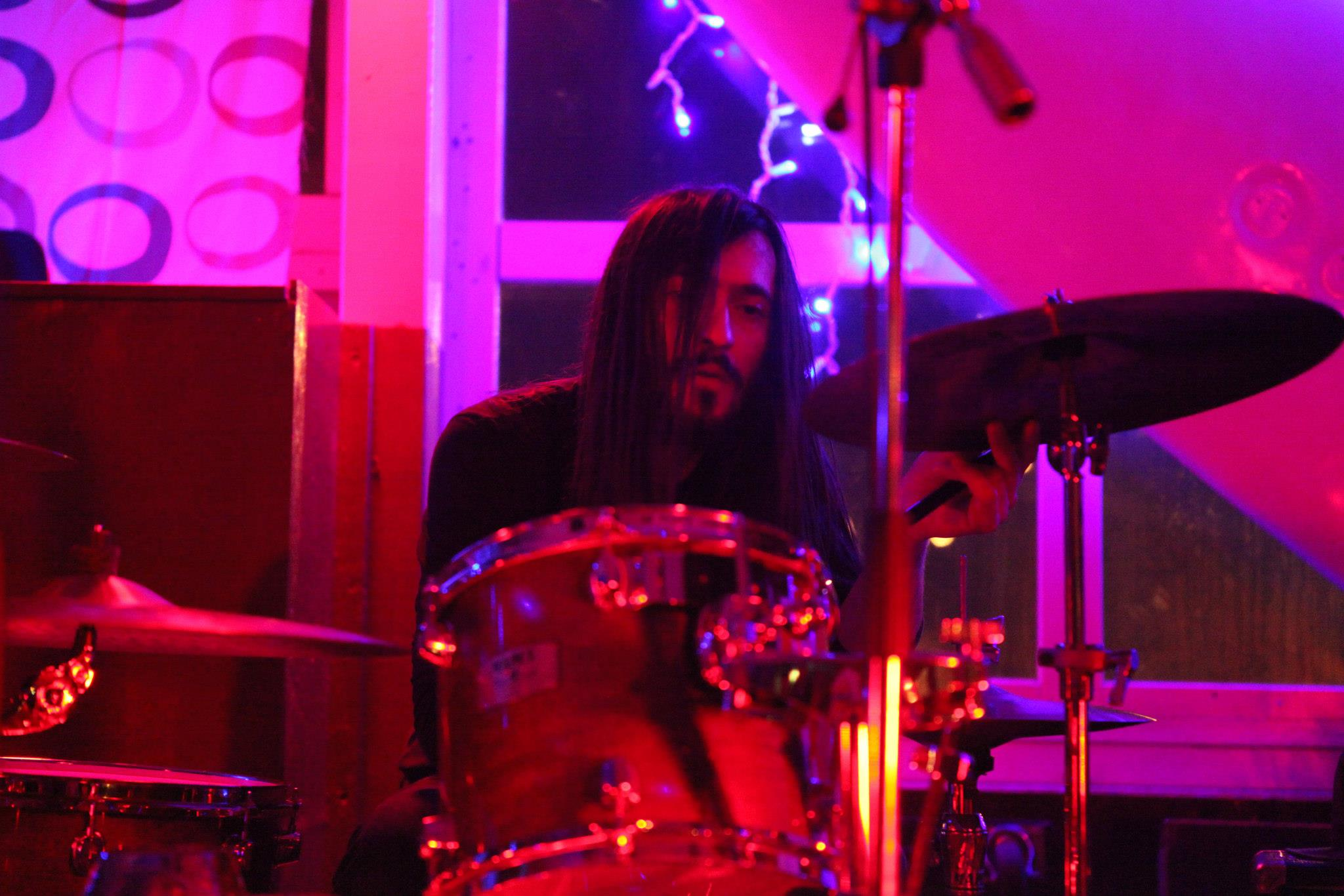 OscarAs